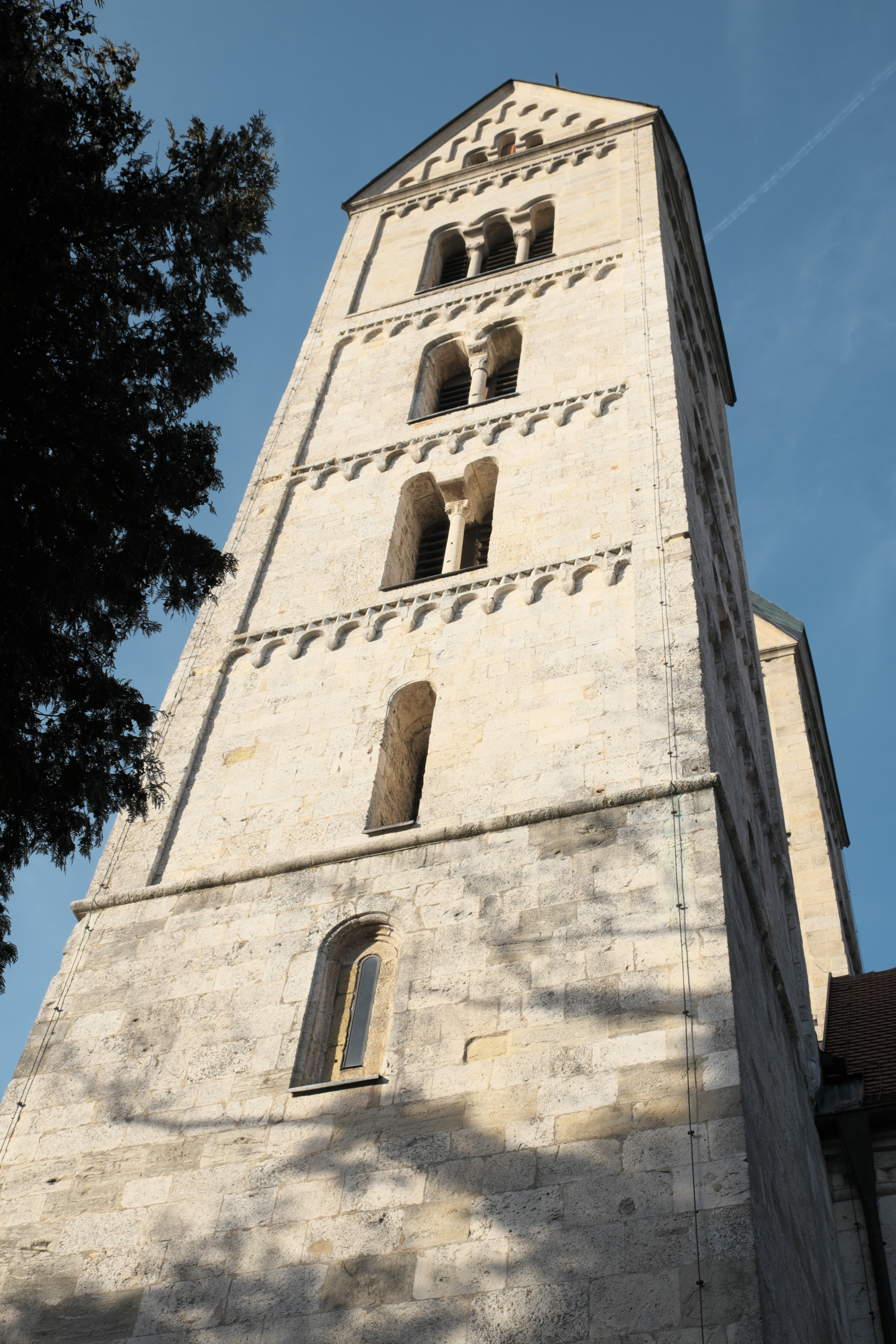 Alte katholische Pfarrkirche St. Peter in Straubing (Bayern/Deutschland), südlicher Glockenturm